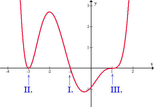 Graph of a polynomial with 1st, 2nd and 3rd order zeroes. Graf polinoma z ničlo prve, druge in tretje stopnje.